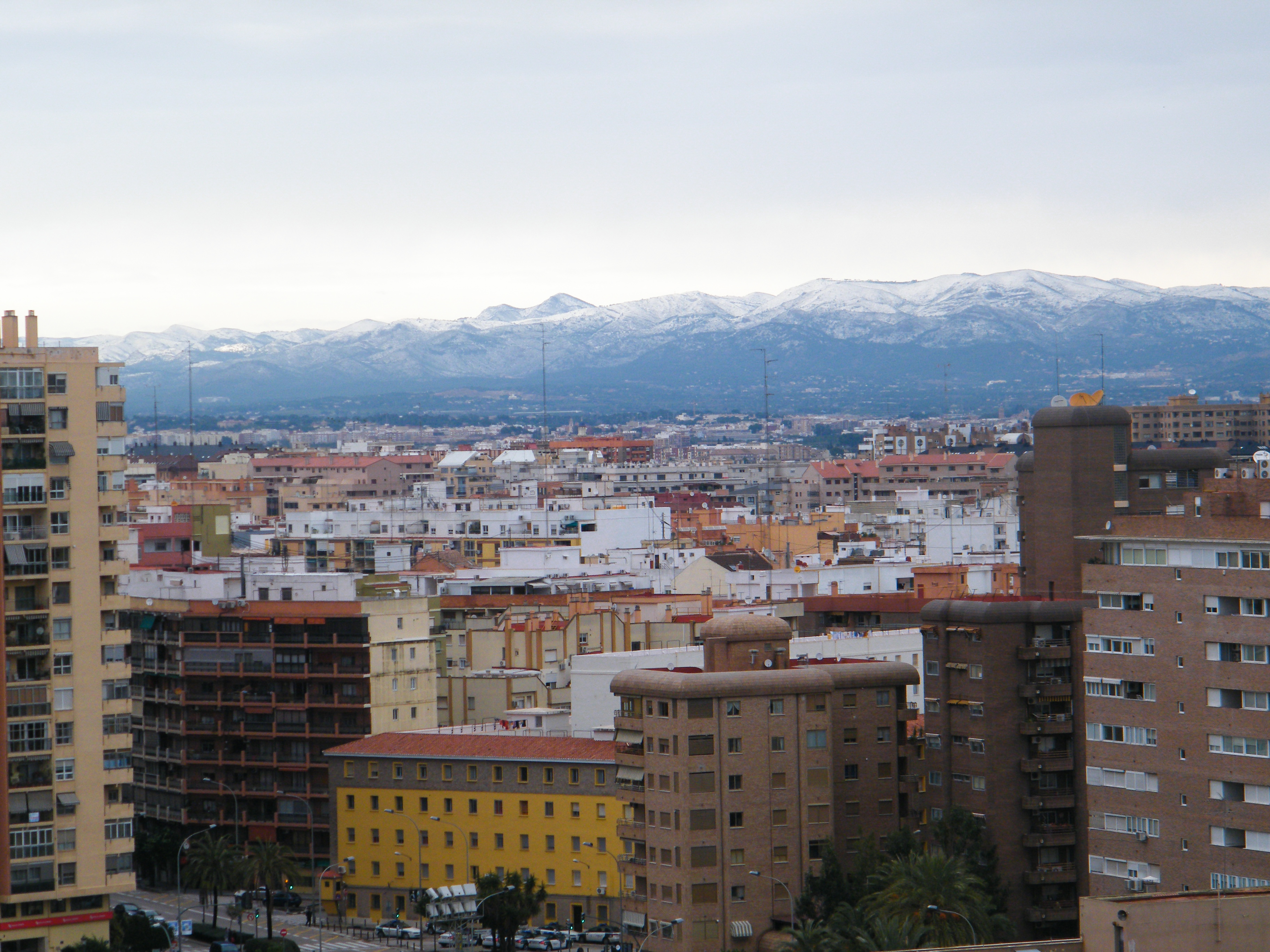 Sierra Calderona nevada vista desde Valencia.